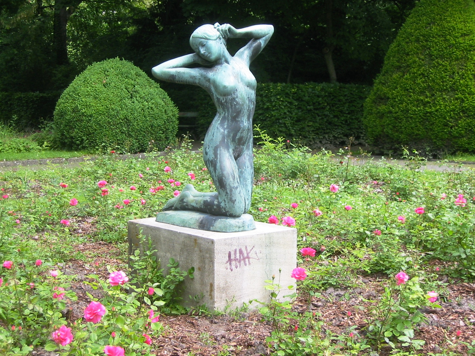 Skulptur "Erwachendes Mädchen" von Josef Limburg im Stadtpark Steglitz im gleichnamigen Ortsteil in Berlin